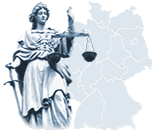 Justitia auf Deutschlandkarte